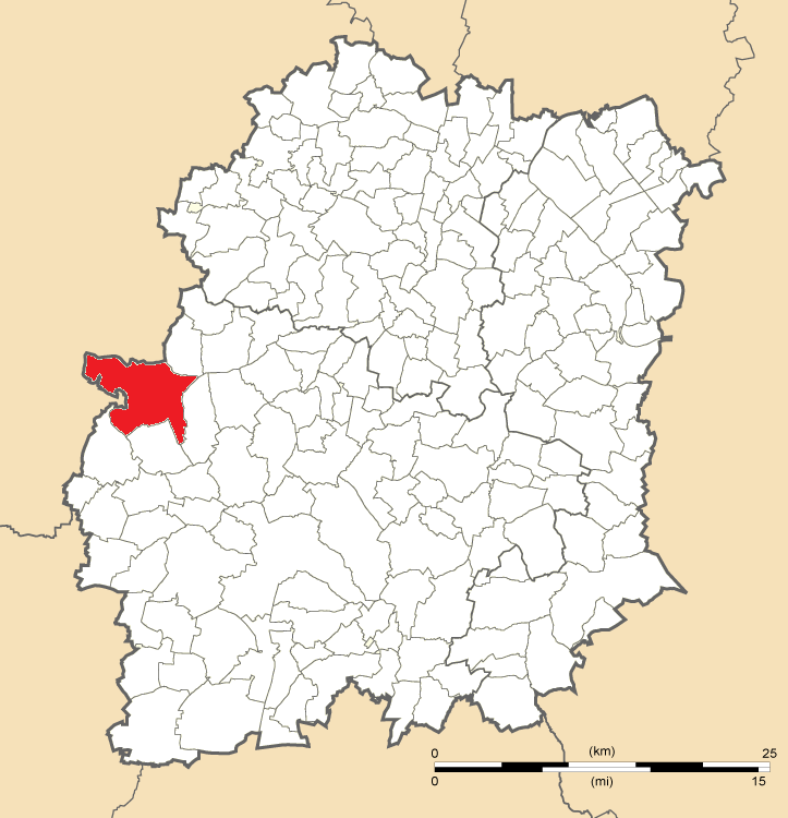 Carte de position de Dourdan en Essonne.